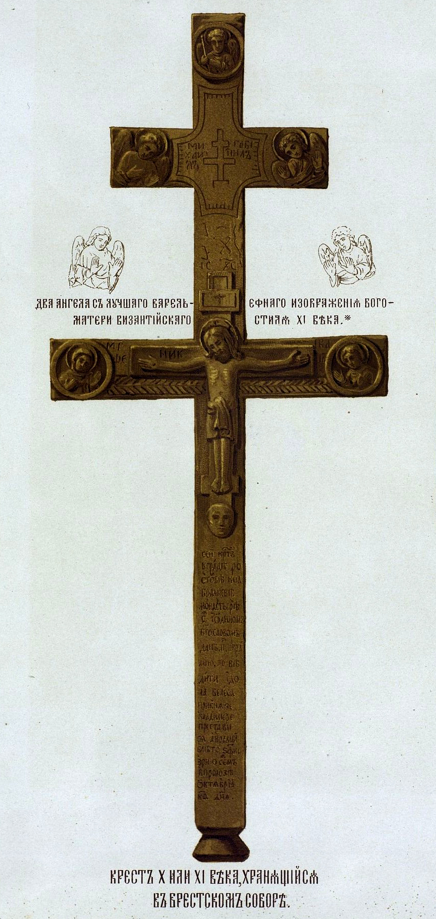 Беларуская (тарашкевіца): 6-канцовы крыж з царквы Сьвятога Мікалая ў Берасьці